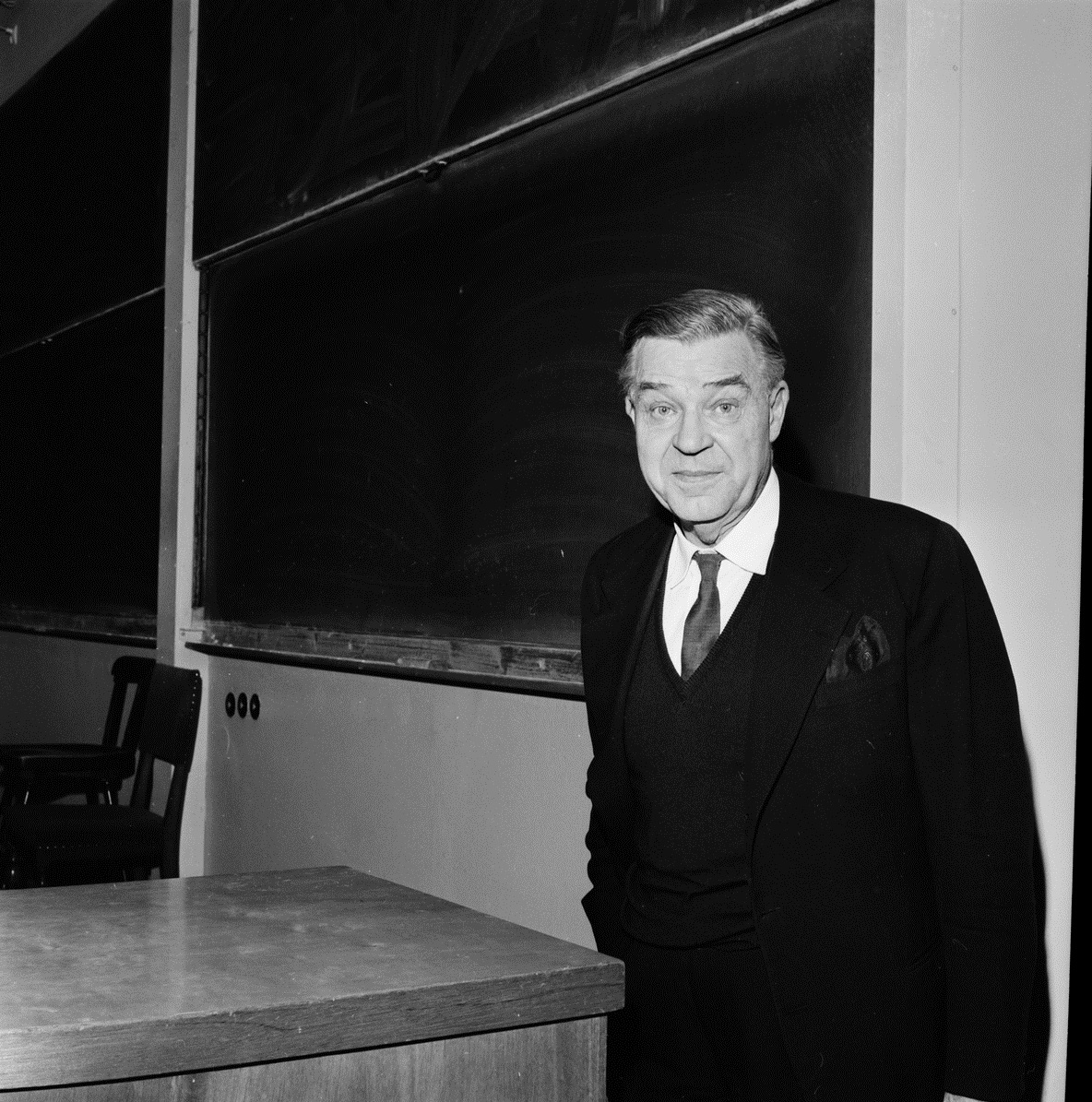 "Långtidsplanerande USA kan bli ett idealland" - Sal X i Universitetshuset var fullsatt när professor Gunnar Myrdal svarade på frågor om sin Amerikabok, Uppsala 1964.